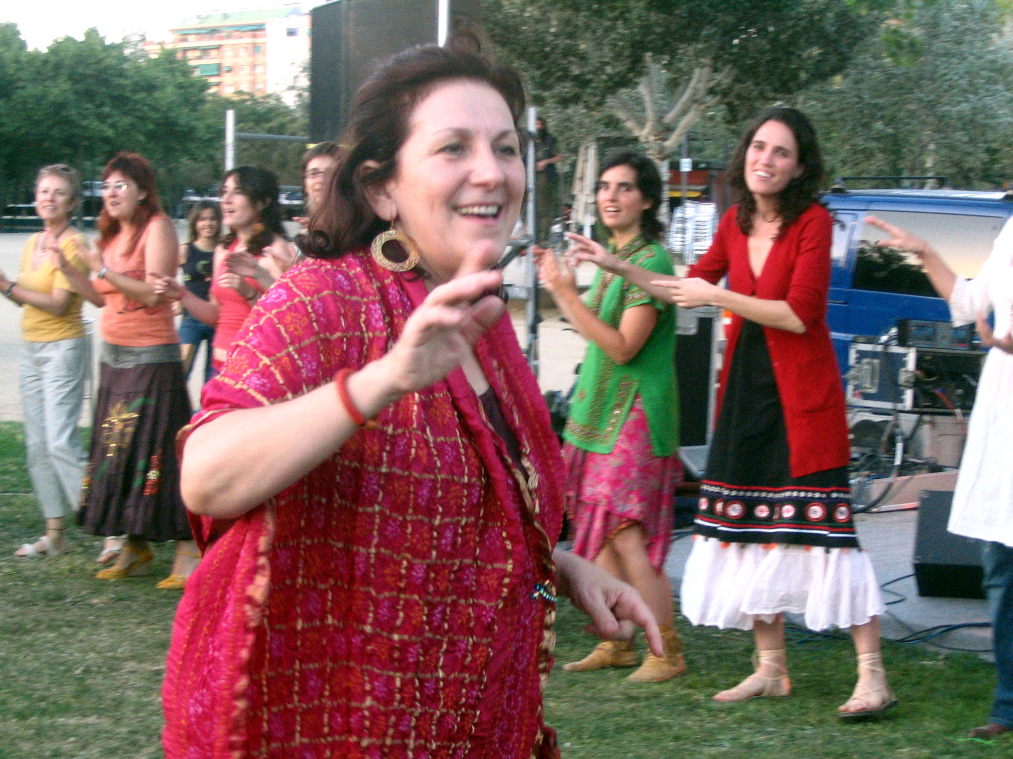 Роса Сарагоса